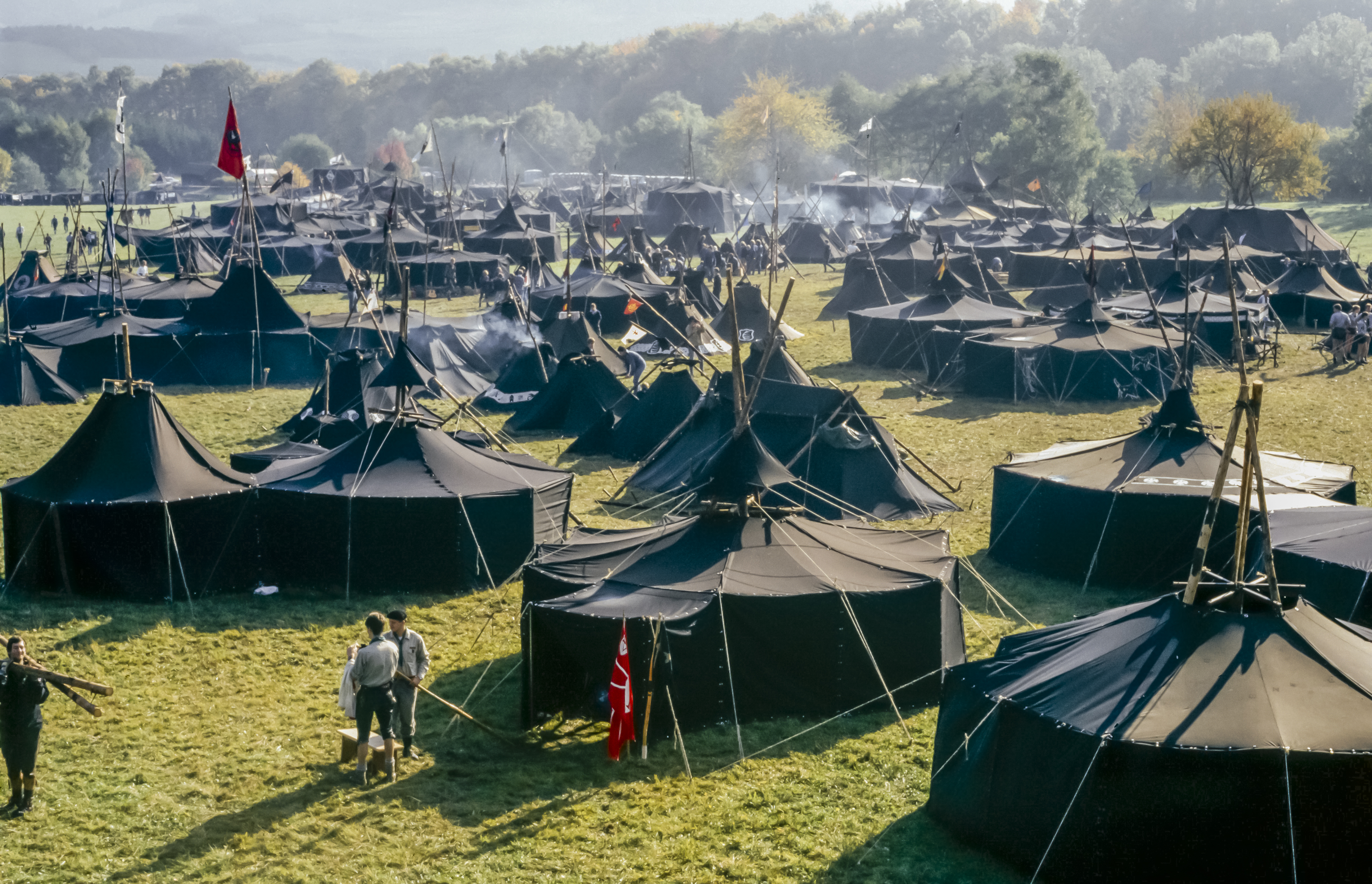 Hoher Meißner, Deutschland: Meißnerlager der Bünde zum 75. Jahrestag des Freideutschen Jugendtages vom 12. - 16. Oktober 1988